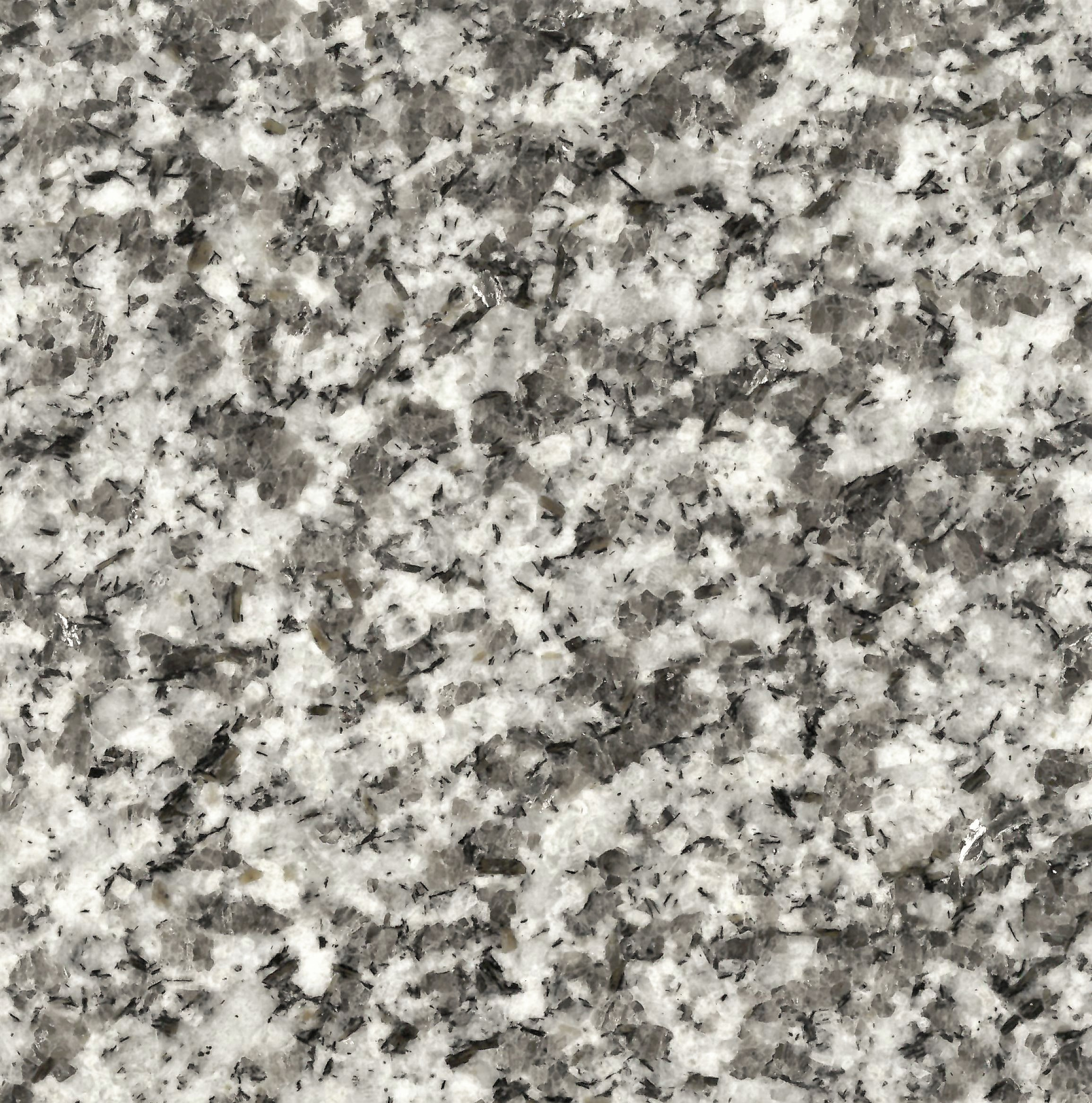 Gris Nevada - polierte Oberfläche